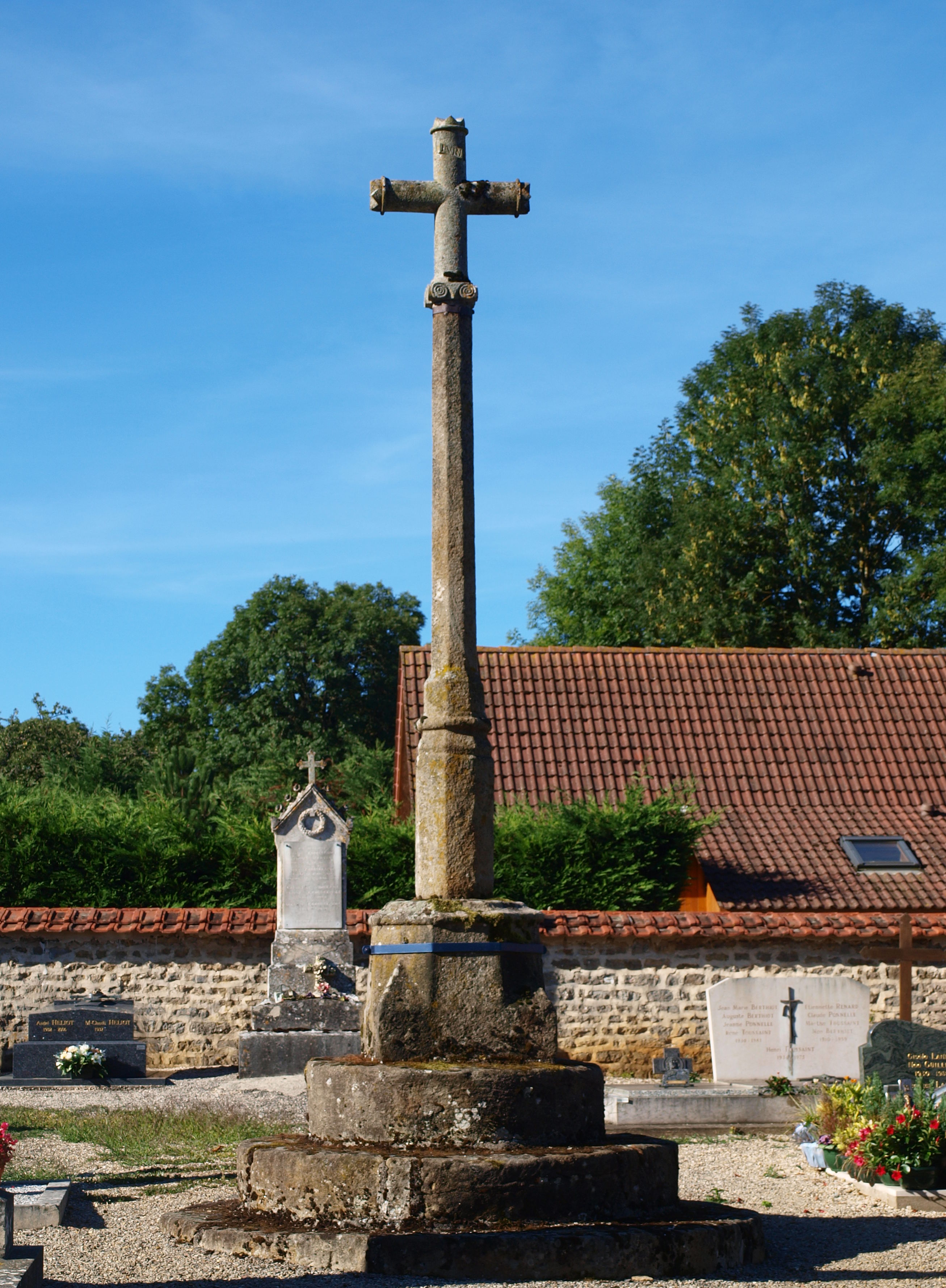 Maconge (Côte d'Or, France) ; calvaire du cimetière.